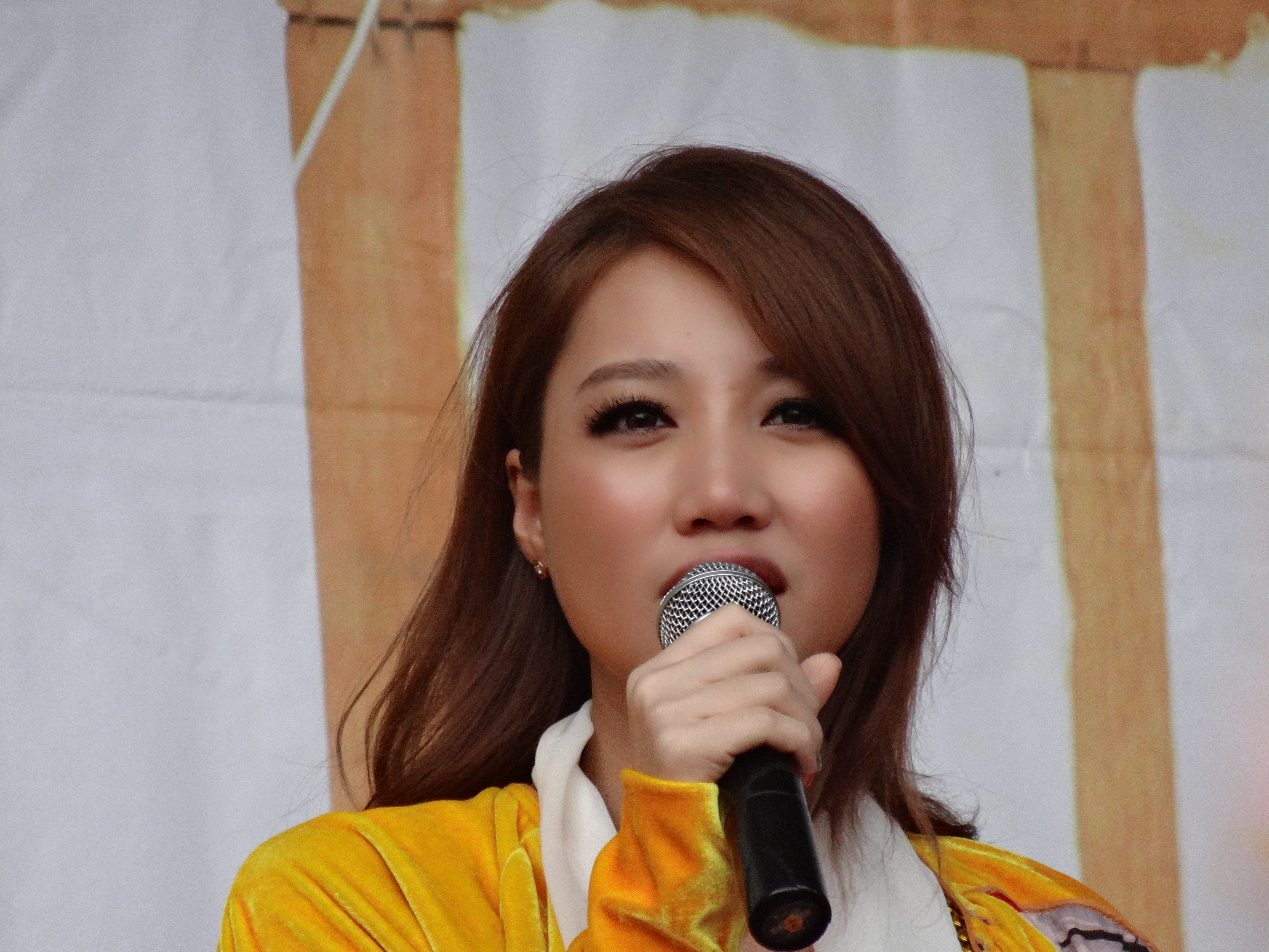 A-Lin